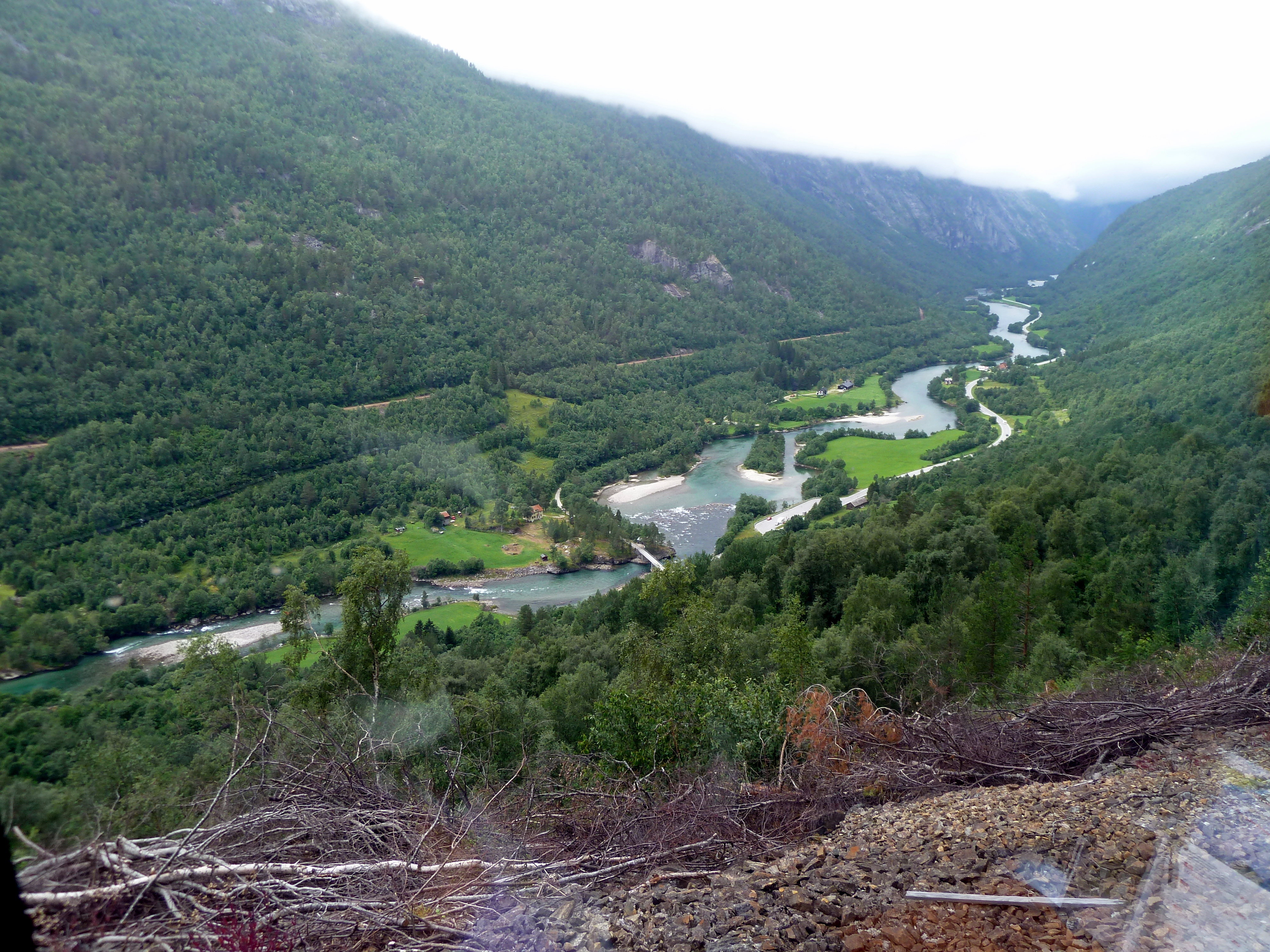 2010-07-30 - Romsdalen